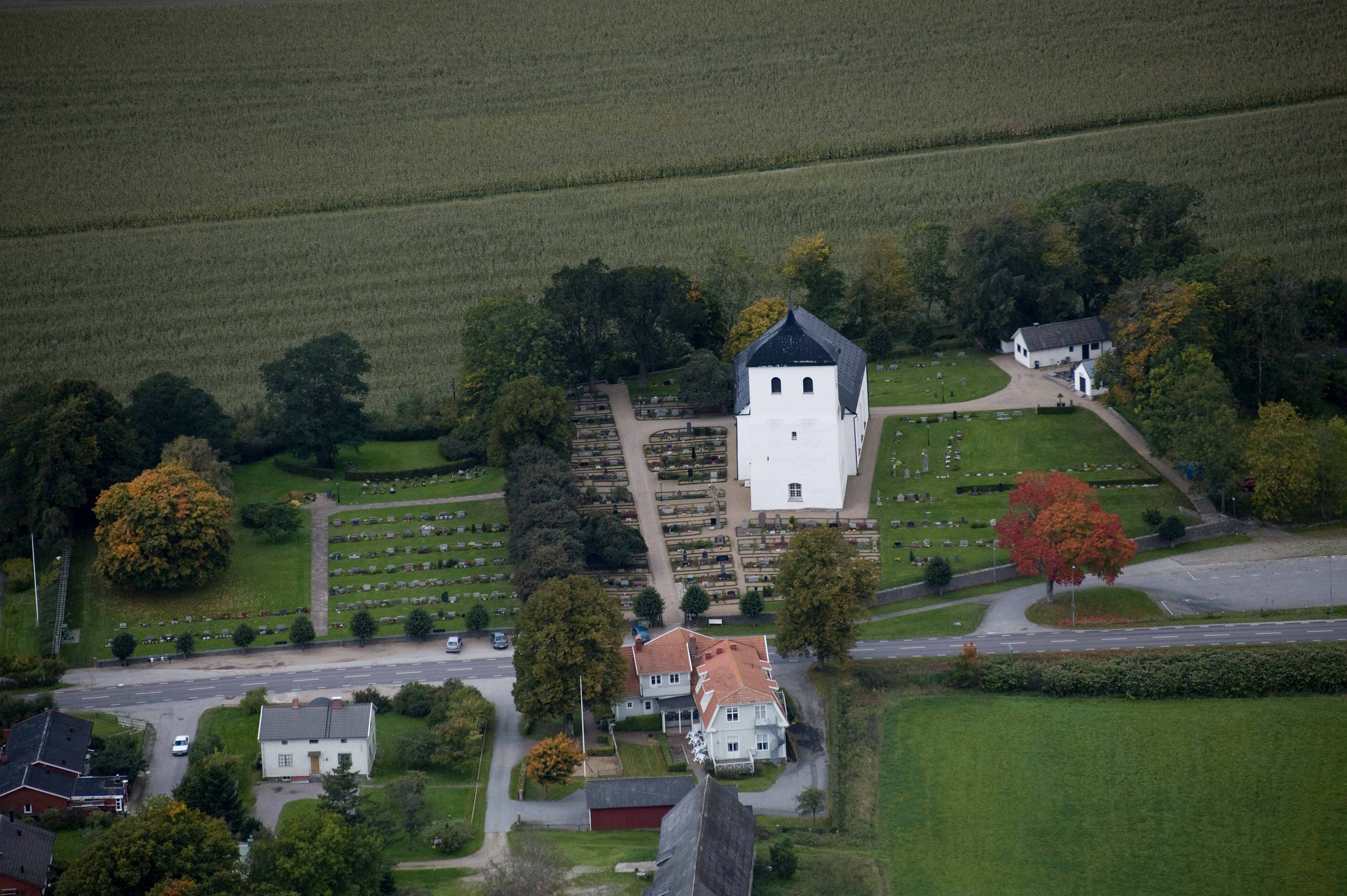 Ramdala kyrka från luften